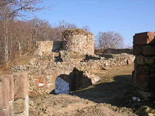 Le vieux château de Rougemont-le-Château (90110) France Photo prise le 03 mars 2004 par LP90 Copyright : GFDL LP90 mars 2004